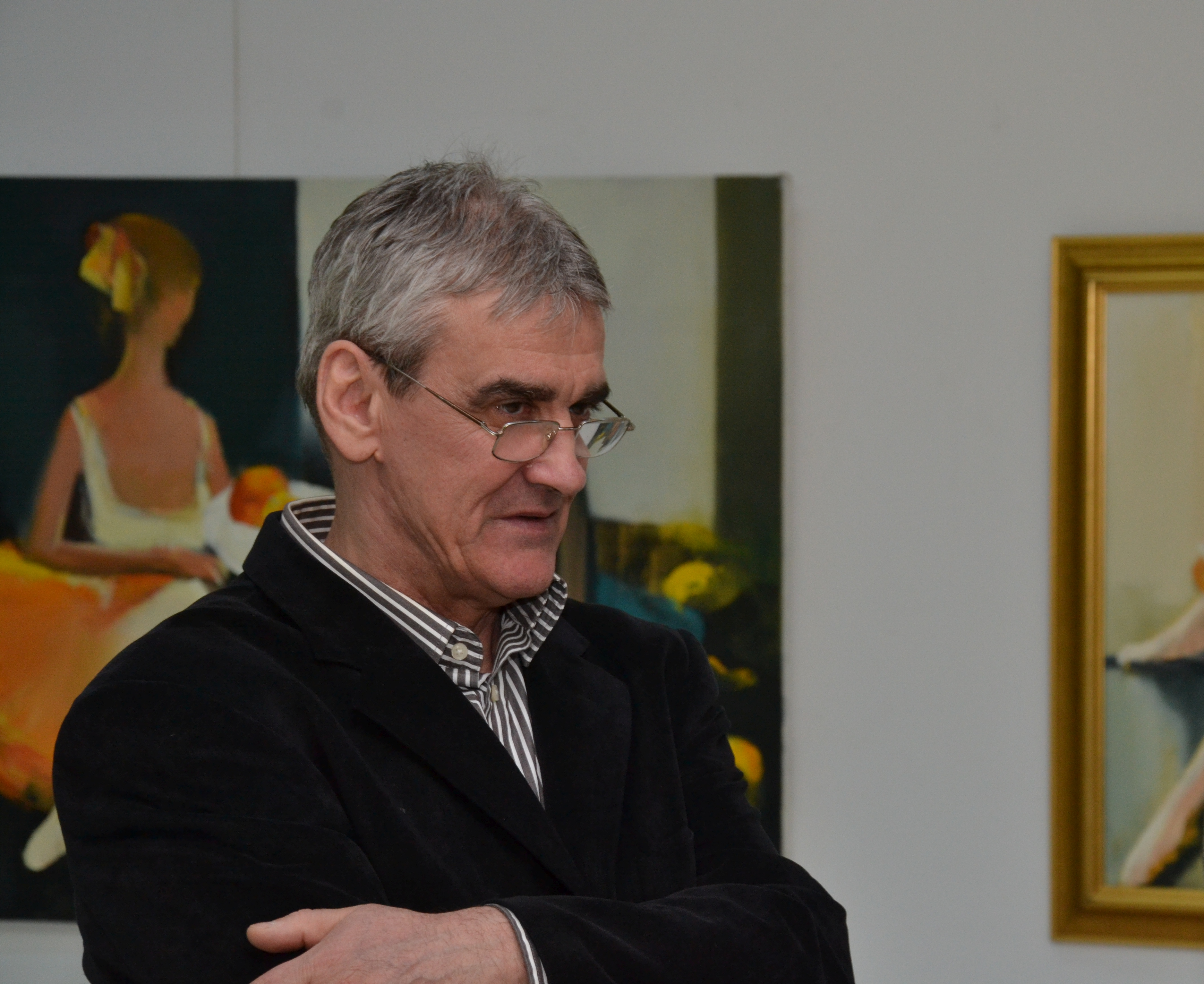 Corneliu Ionescu - Foto